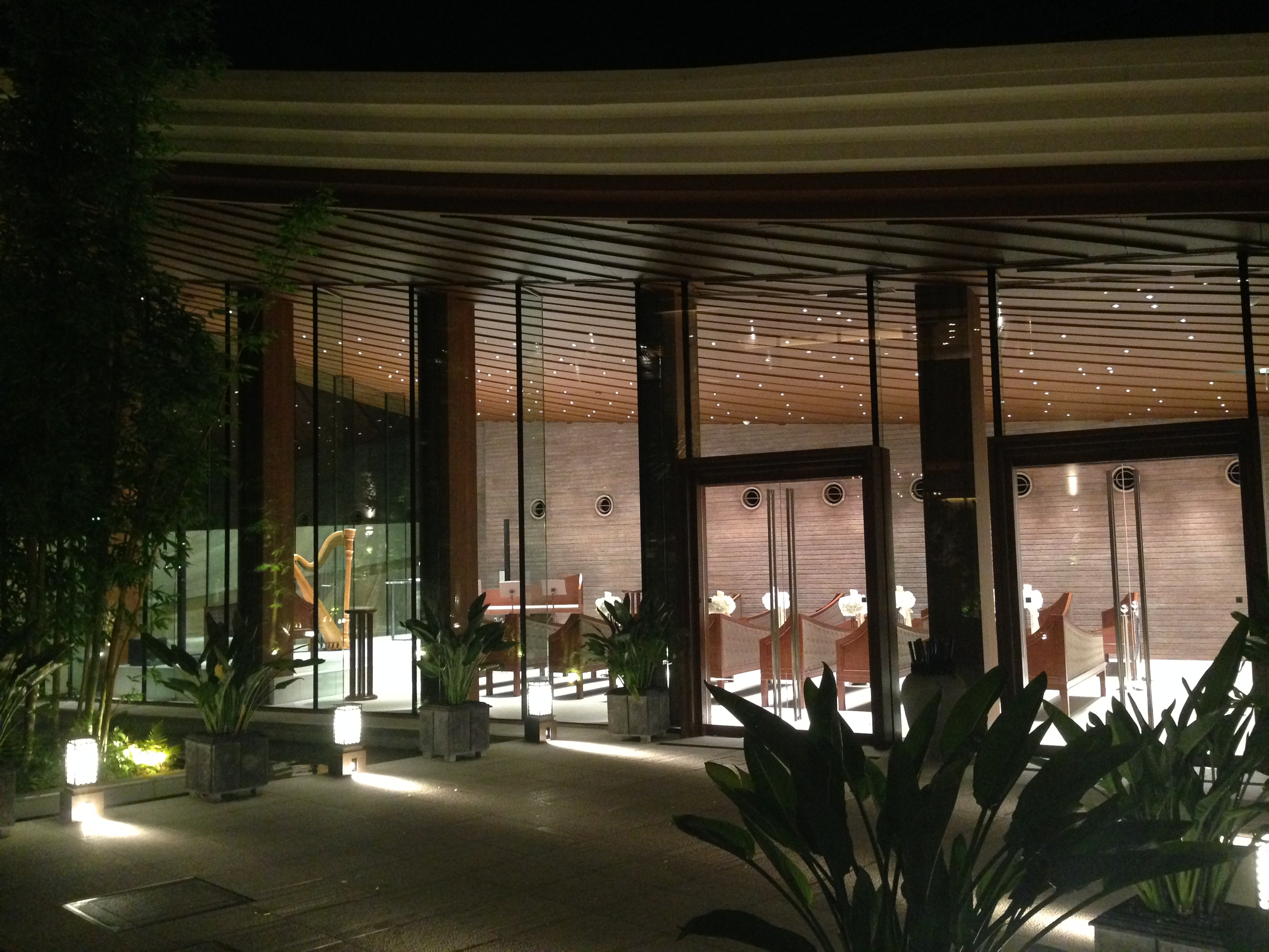 横浜市みなとみらい地区の結婚式場「グランドオリエンタルみなとみらい」にある挙式会場「サウンドホール」（音楽堂）。